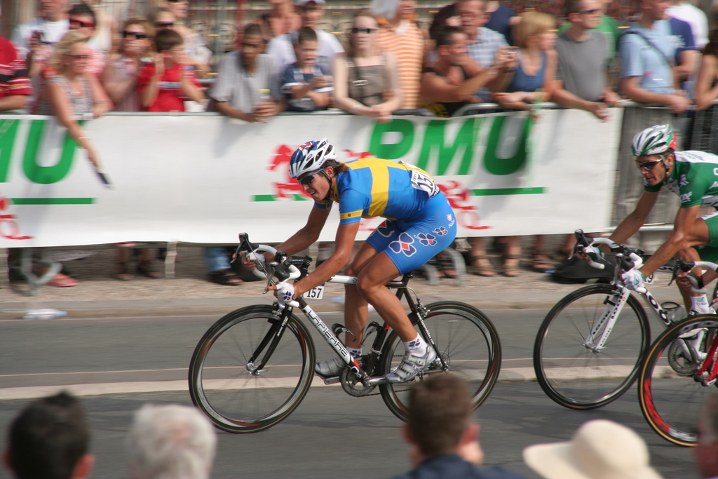 Thomas Lövkvist (Tour de France 2006)